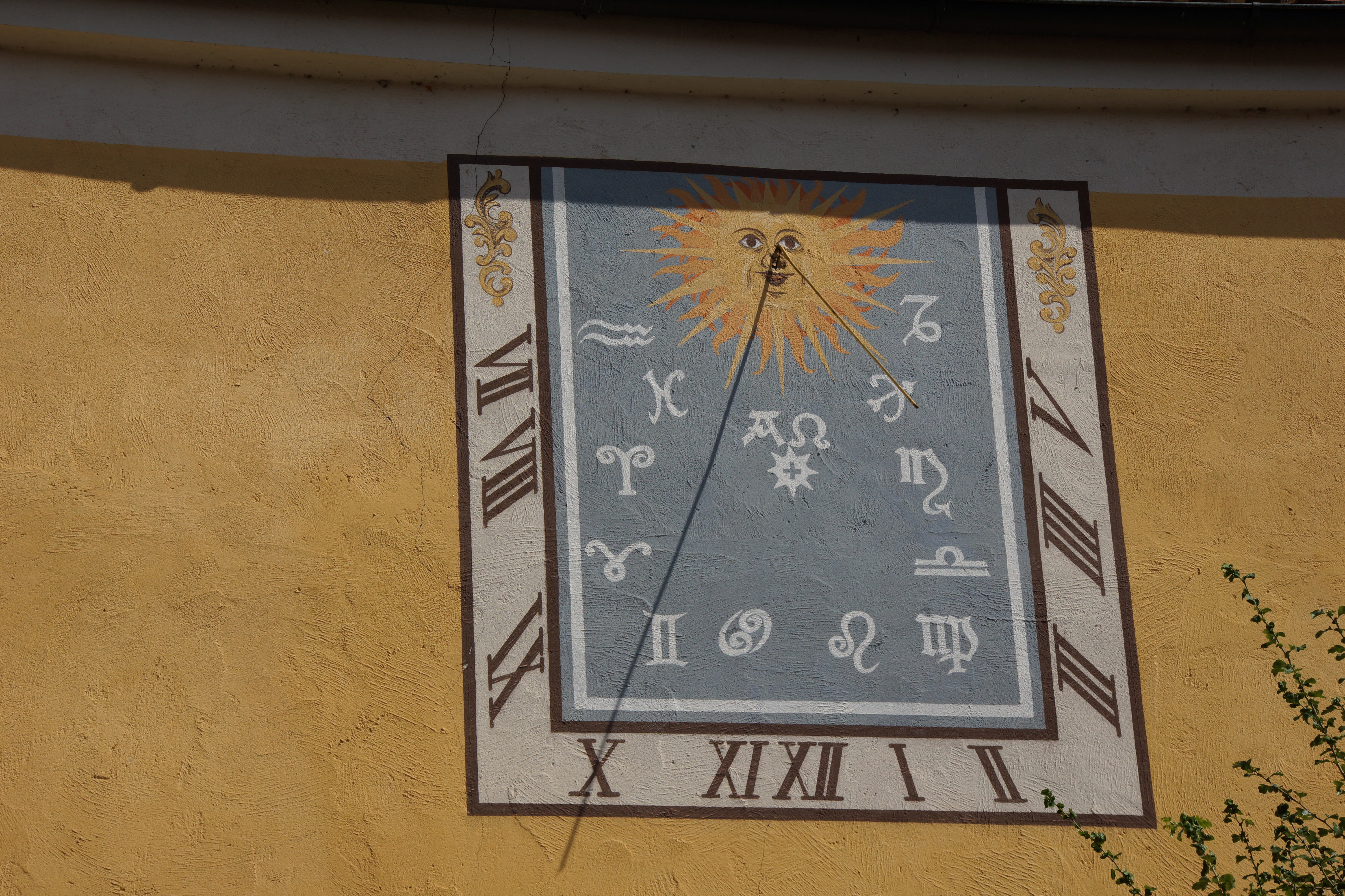 Die katholische Pfarrkirche Mariä Himmelfahrt in Berching in der Oberpfalz